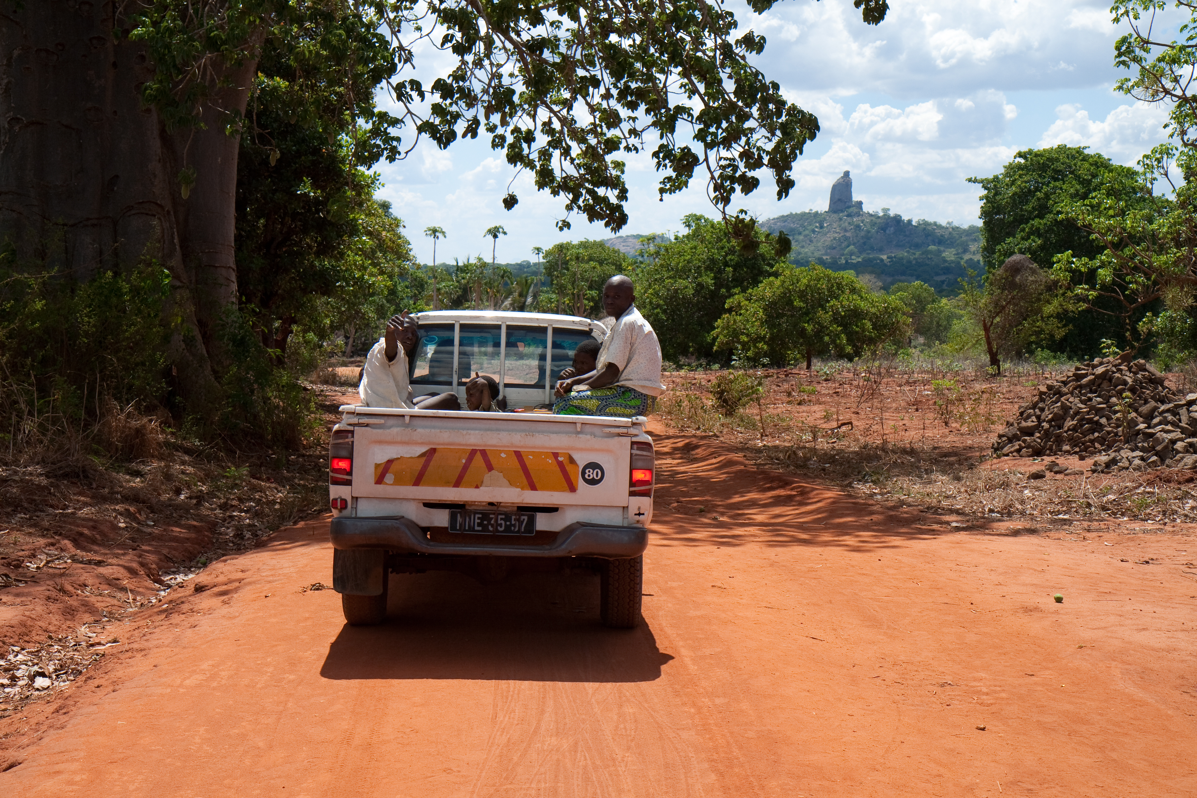 Toyota Hilux 2.8 D on a road in Nampula, Mozambique